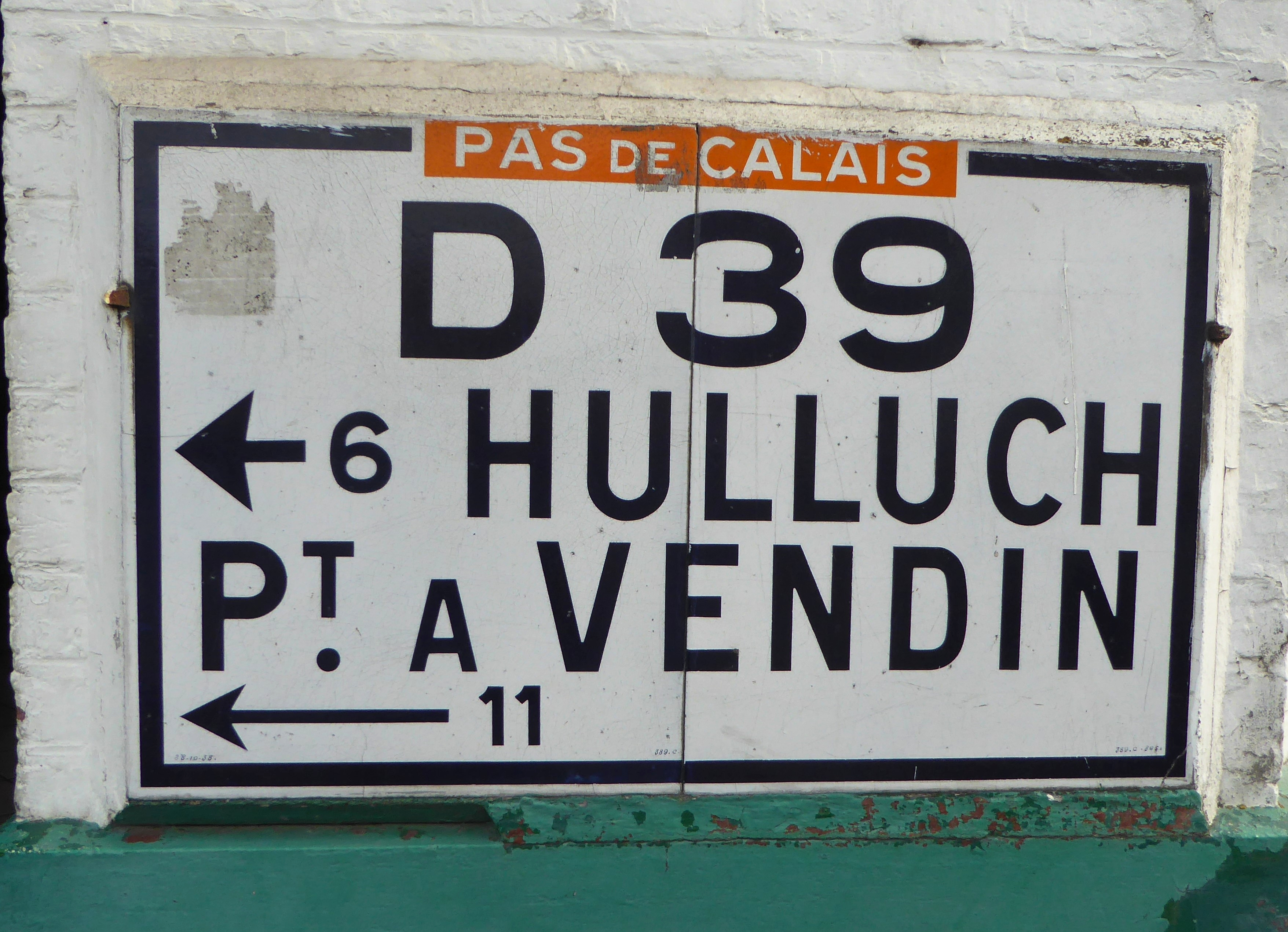 Borne Michelin Hulluch-Pt à Vendin de Vermelles, Pas-de-Calais, Nord-Pas-de-Calais-Picardie.- France.